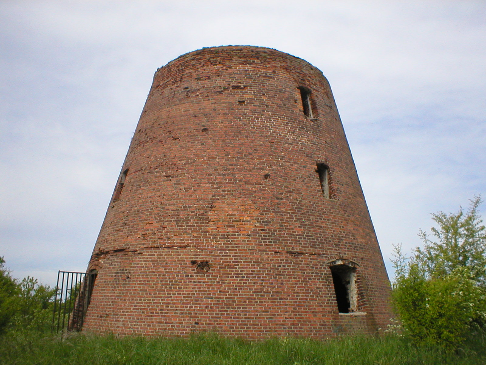 Ruiny wiatraka w Łęczu na Wysoczyźnie Elbląskiej